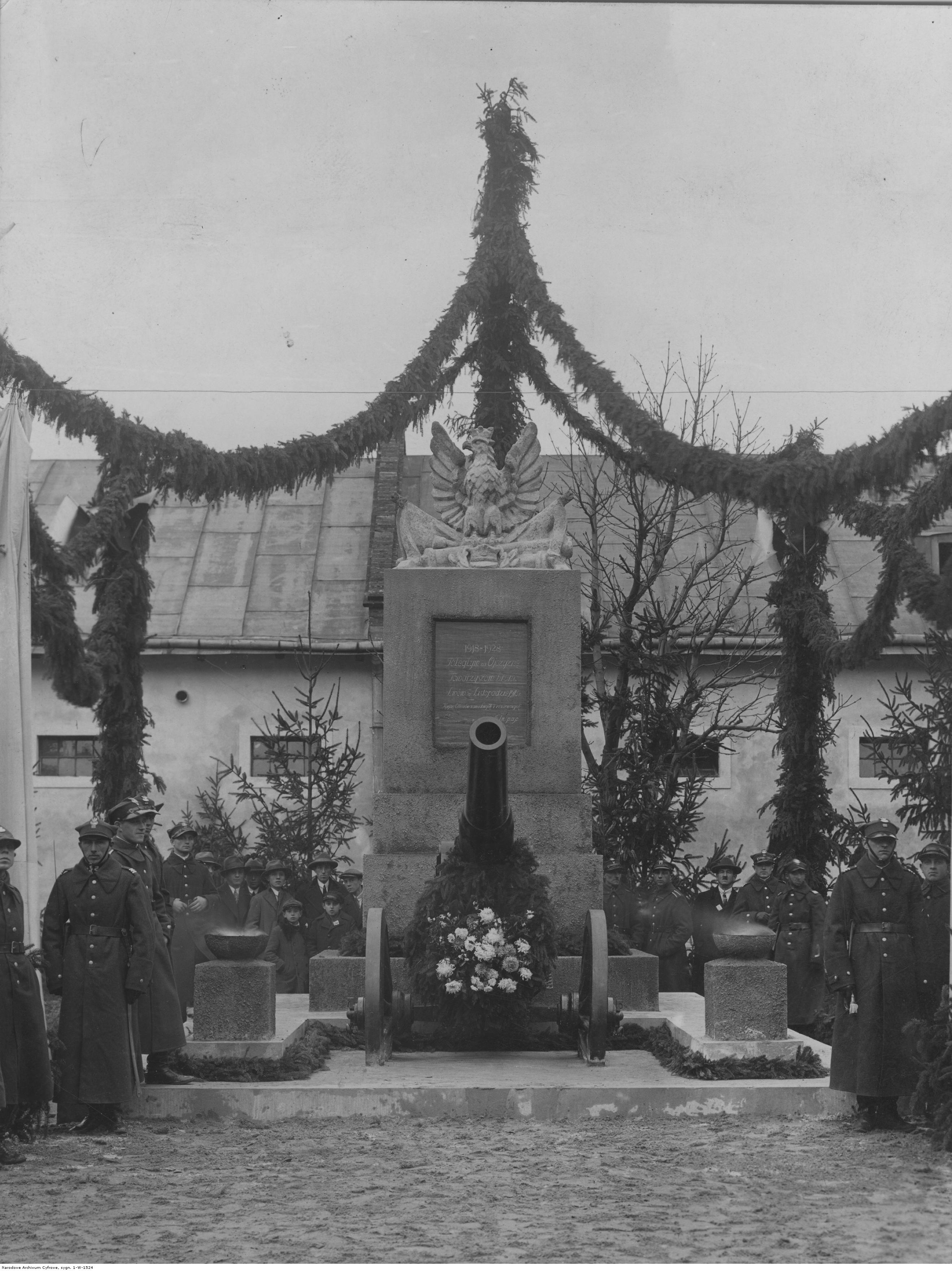 Odsłonięcie pomnika ku czci poległych żołnierzy 5 Pułku Artylerii Polowej we Lwowie; 1928 r. Koncern Ilustrowany Kurier Codzienny - Archiwum Ilustracji. Sygnatura: 1-W-1524